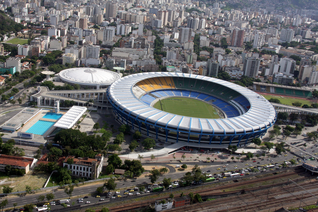 Maracanã - Rio de Janeiro, Brasil